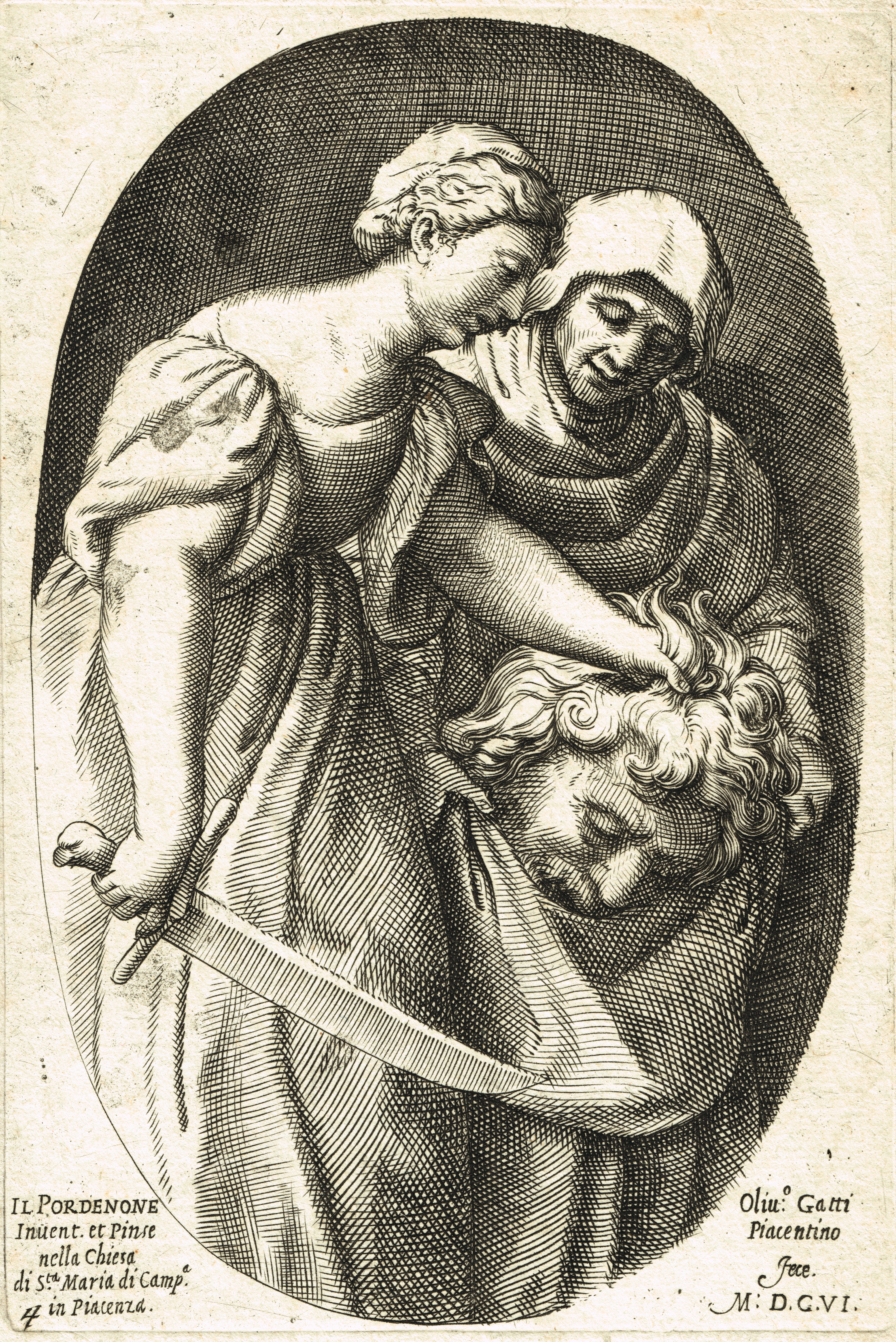 Judith mettant la tête d’Holoferne dans un sac que tient une vieille - Gravé par Oliviero Gatti en 1606 d’après Il Pordenone